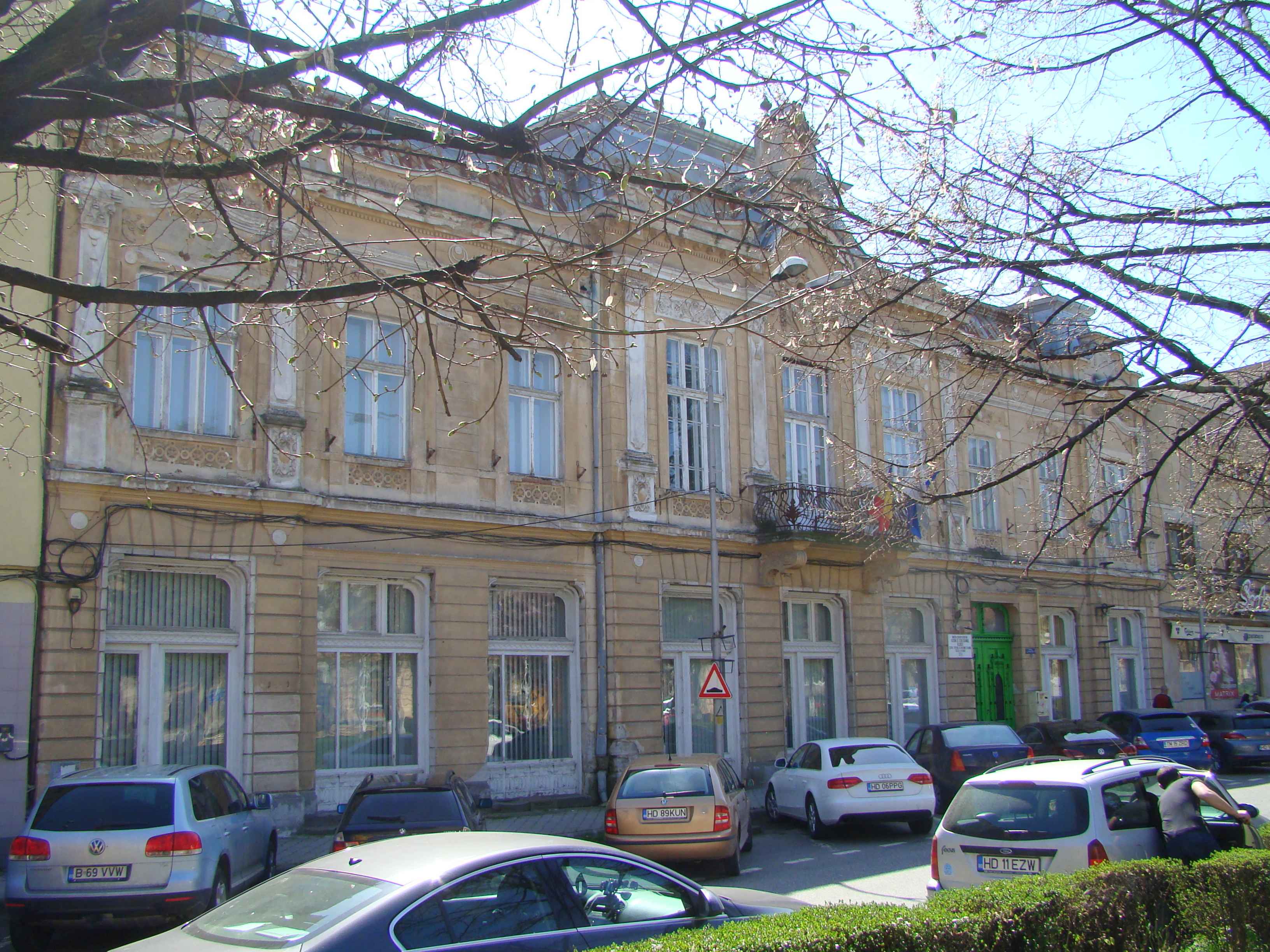 Banca de Investiții, azi Centrul teritorial de învățământ economic, municipiul Deva, Piața Unirii 3